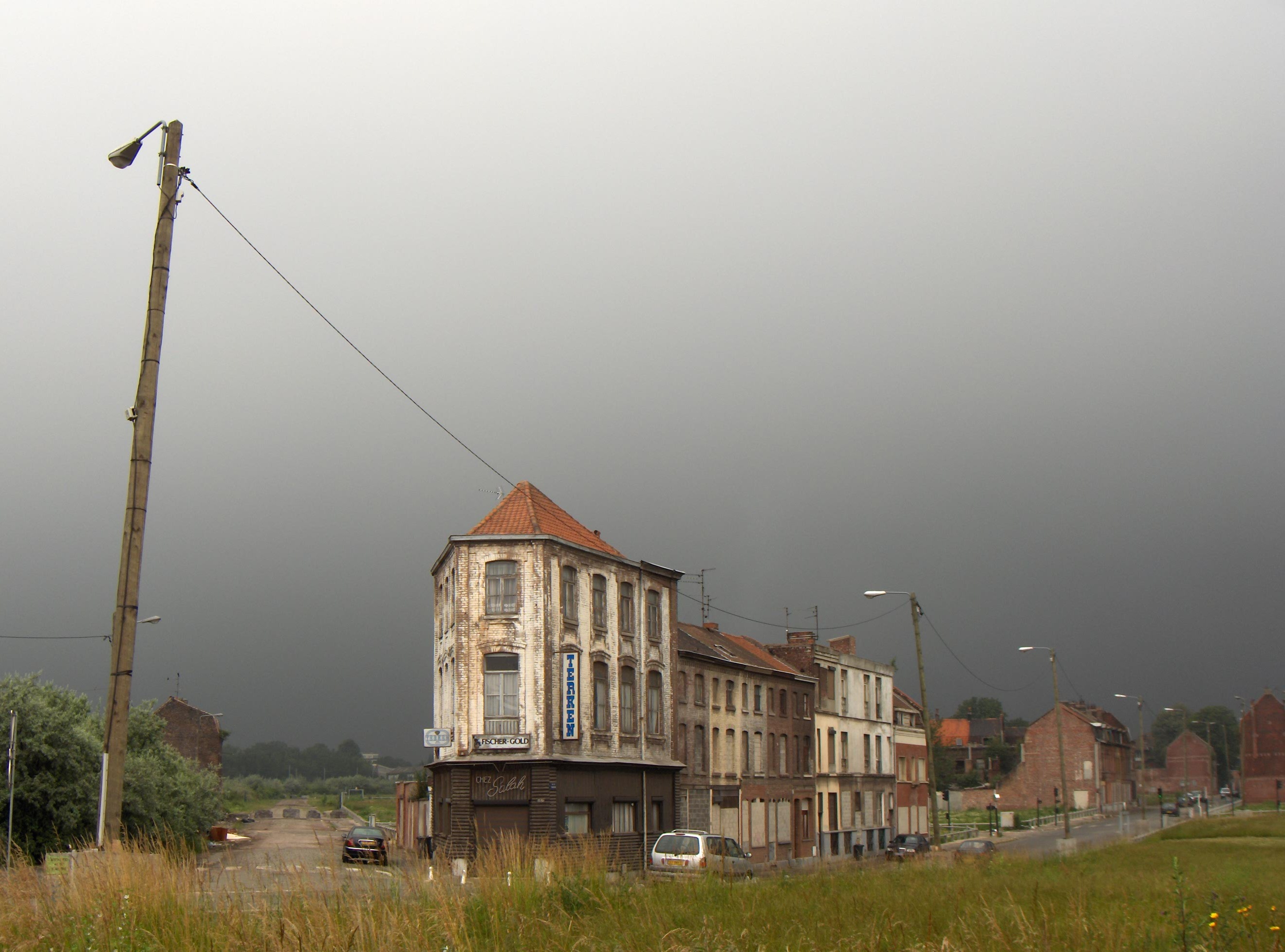 Roubaix (France, dépt. Nord), rue de Tourcoing (à droite) et rue de Menin (à gauche), dans la "Zone de l'Union" au nord du centre-ville. Roubaix in Nordfrankreich, rue de Tourcoing (rechts) und rue de Menin (links), ehemaliges Arbeiter- und Industrieviertel, zur Zeit sog. Sanierungsgebiet "Zone de l'Union".